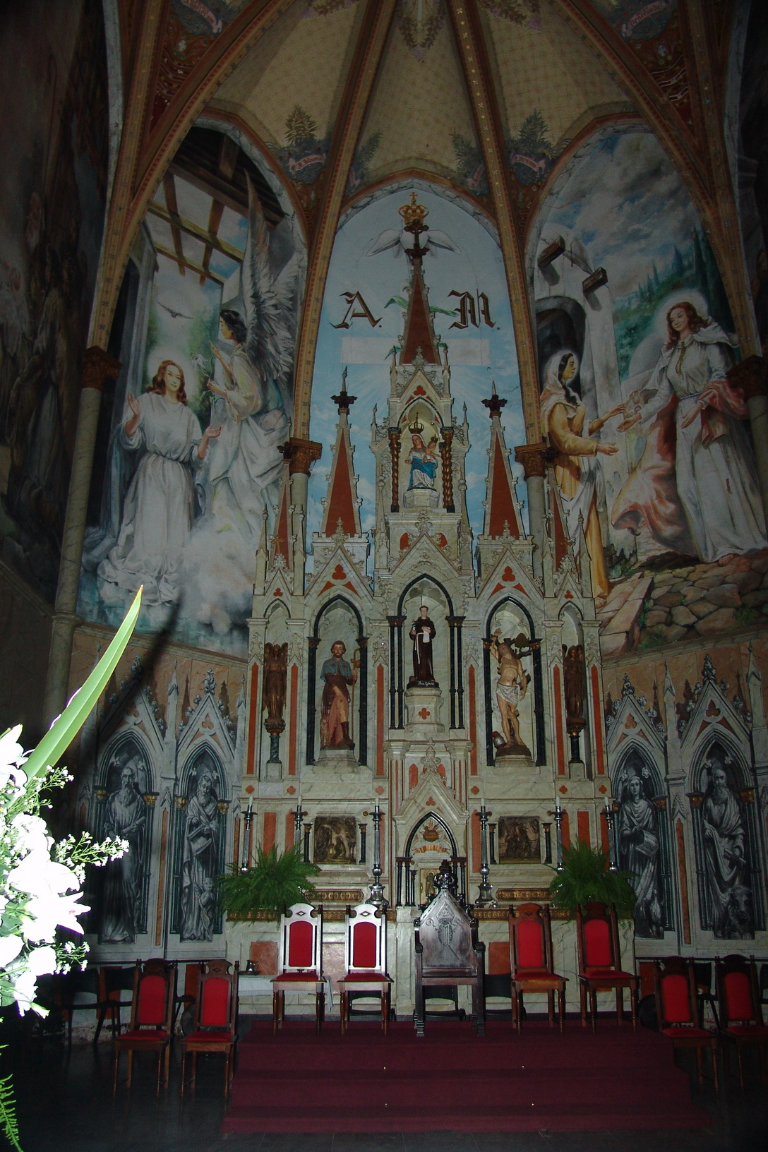 Foto do município de Jaú, São Paulo, Brasil